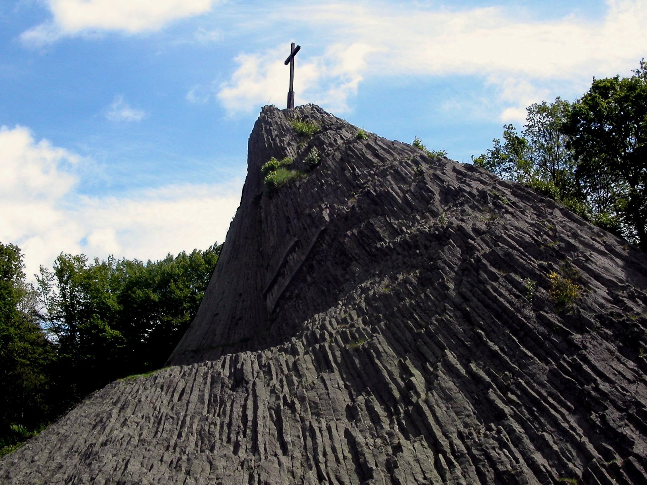 Nationales Geotop "Druidenstein"